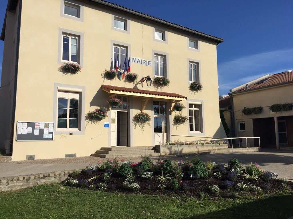 Mairie de la commune de Cellieu (42)